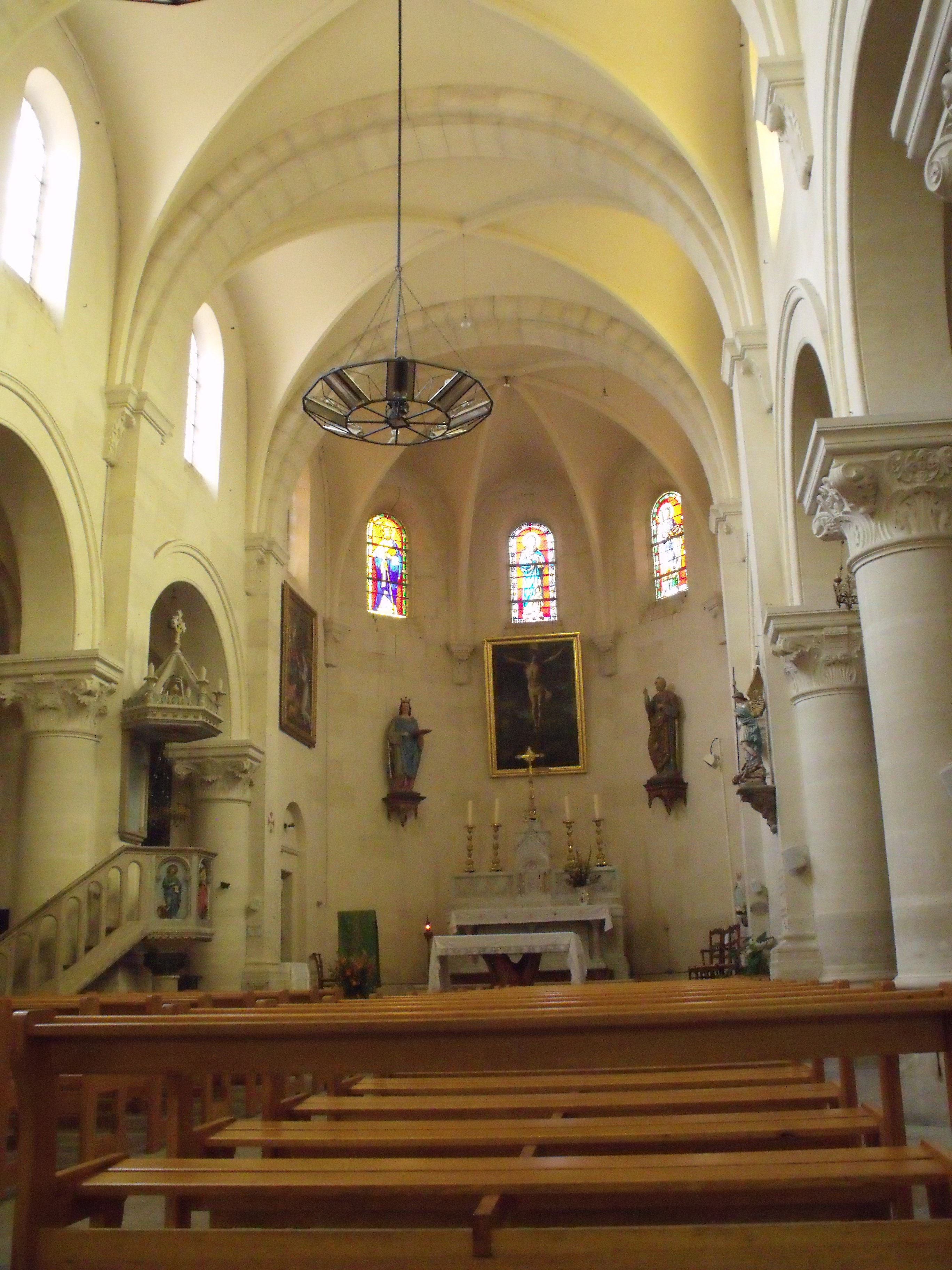 Église d'Aureille (Bouches-du-Rhône).